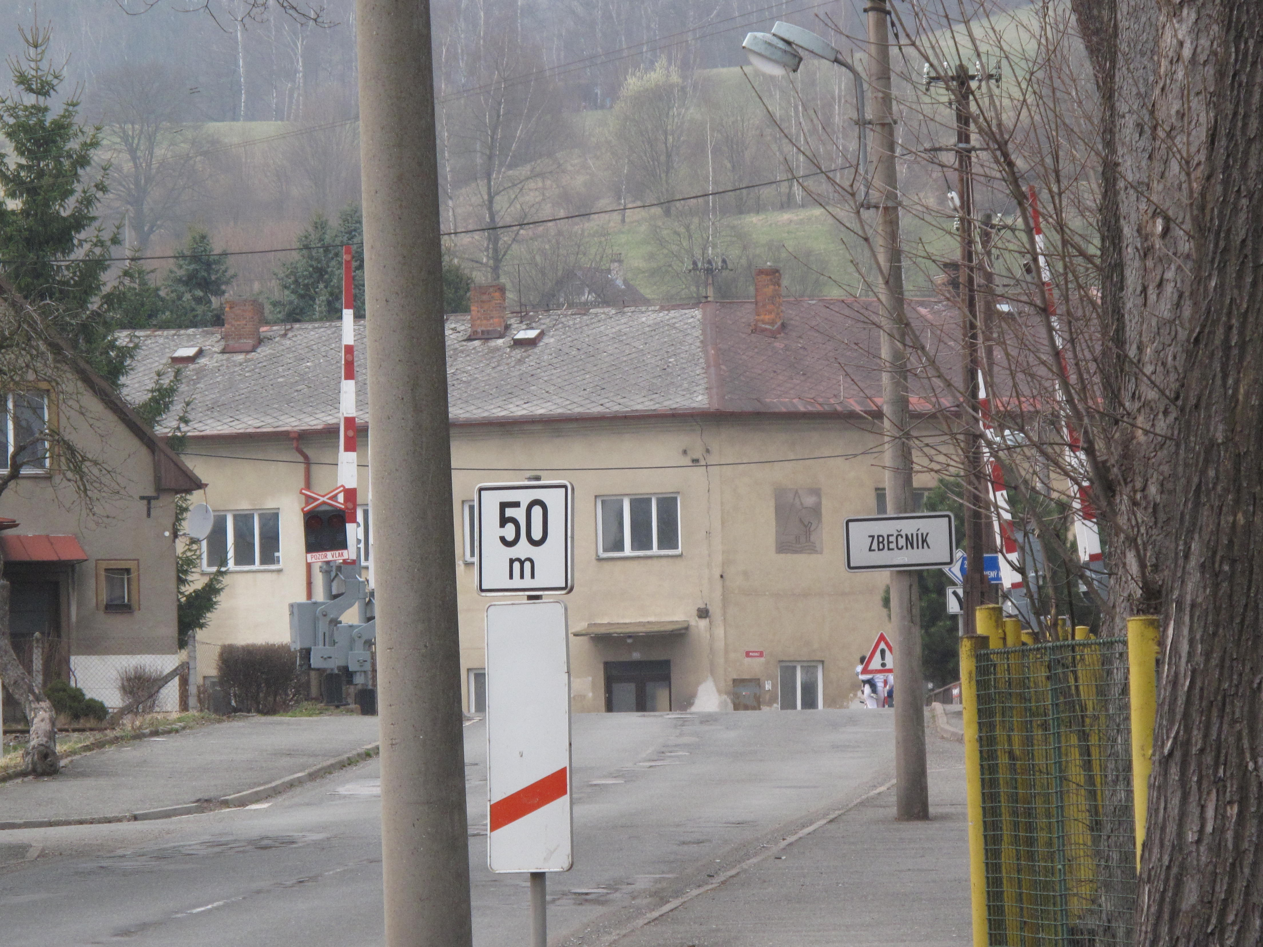 Hranice Hronov - Zbečník